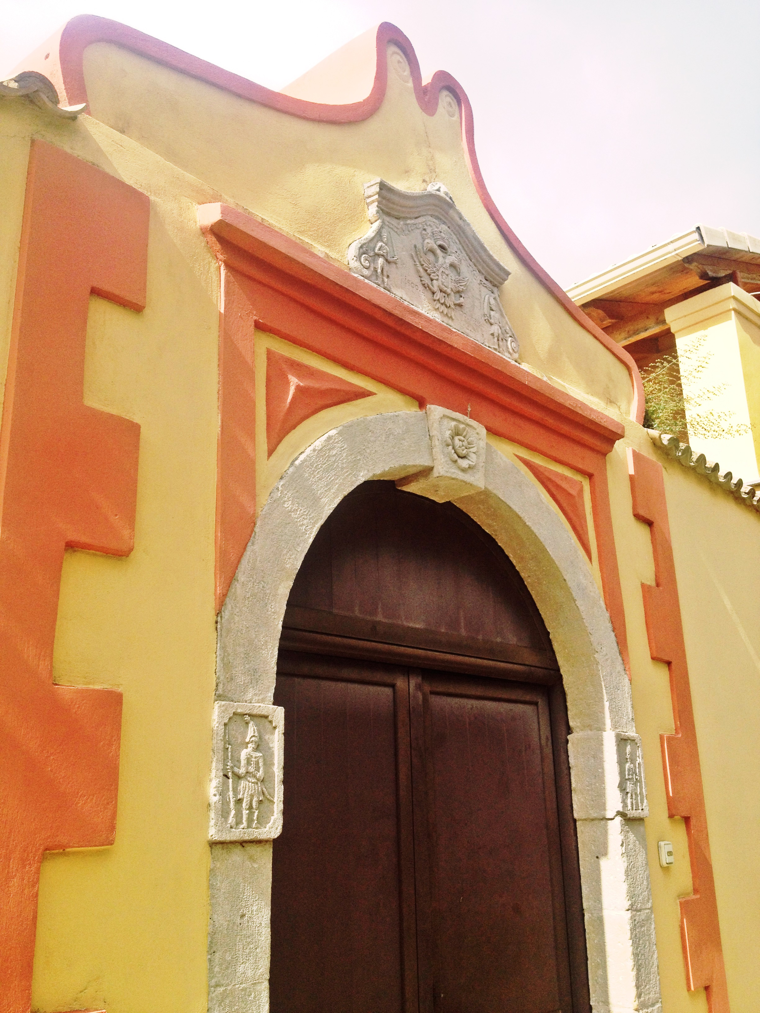 Το αρχοντικό του Πρινύλα